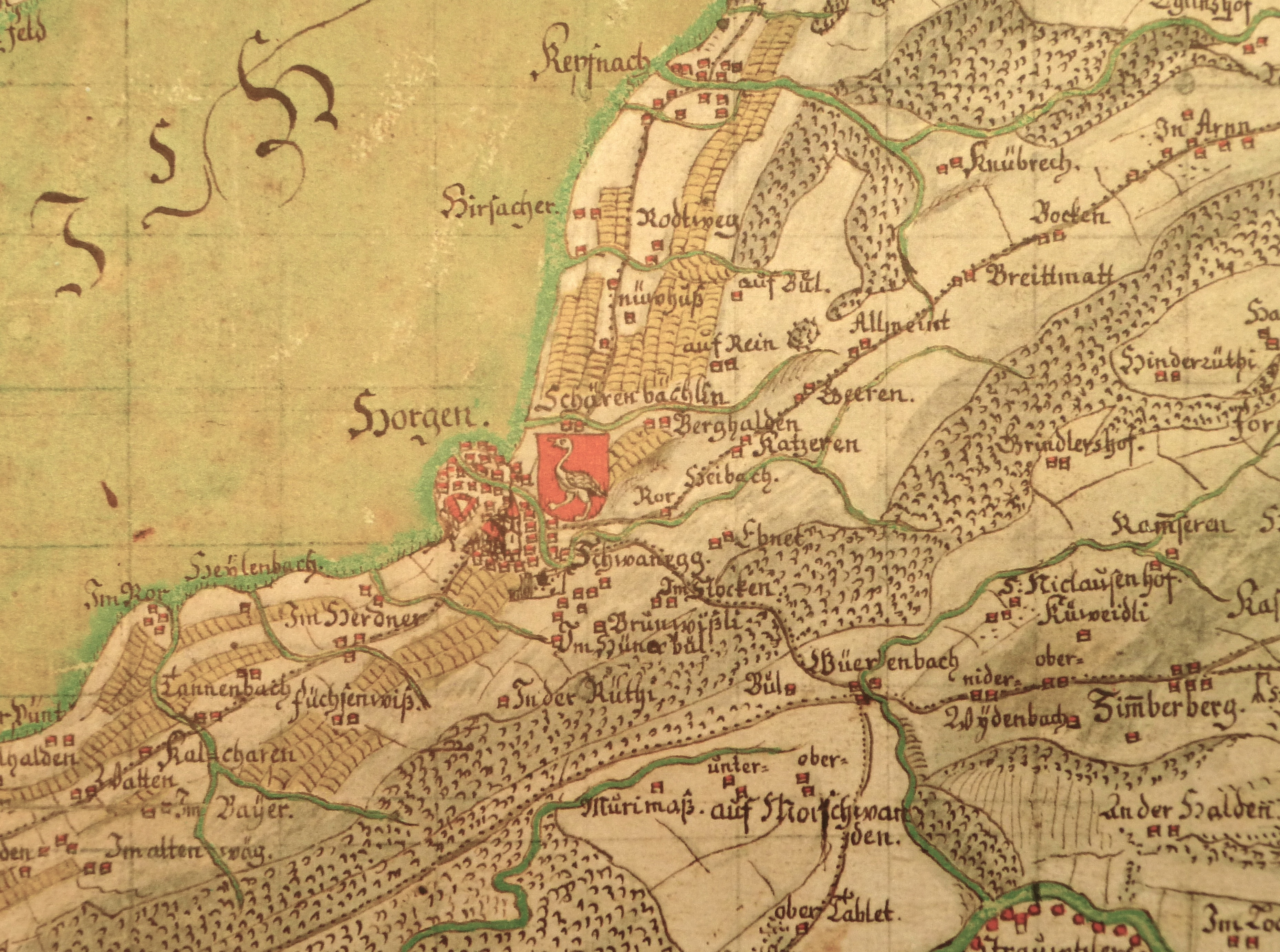 Hans Conrad Gyger: Horgen auf der «Karte des Kantons Zürich aus dem Jahr 1667 in 56 Blättern von Hans Conrad Gyger».